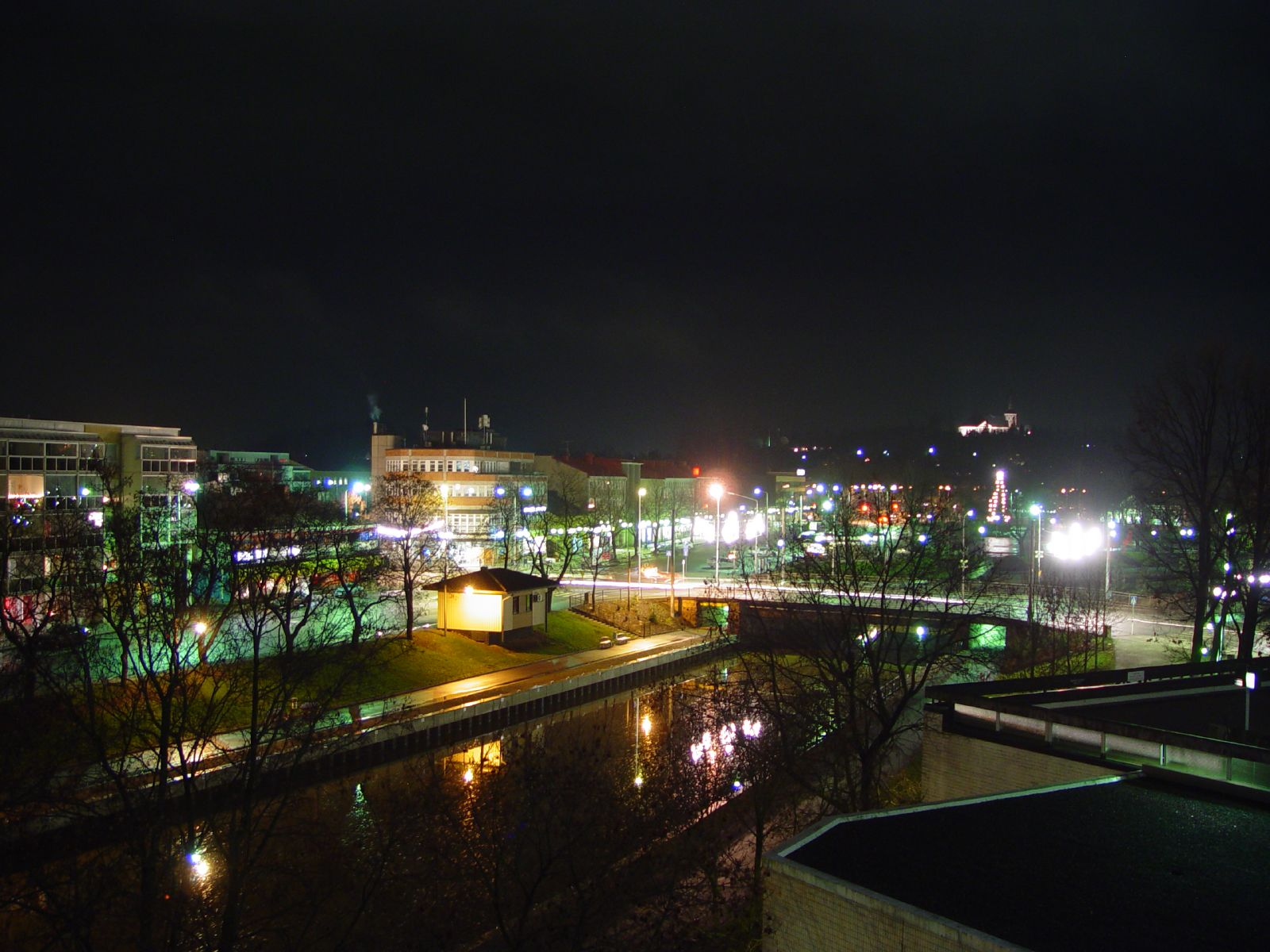 Salon kaupungin öinen keskusta. Salonjoki.